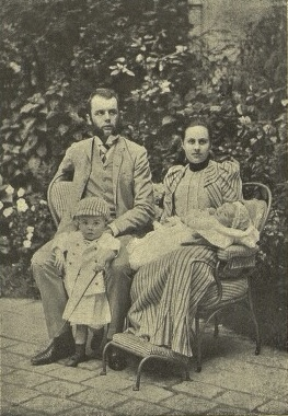 Jan Nepomuk s rodinou, Protivín 1892